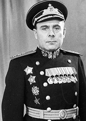 Арсений Григорьевич Головко (1906 — 1962) — советский военачальник, адмирал